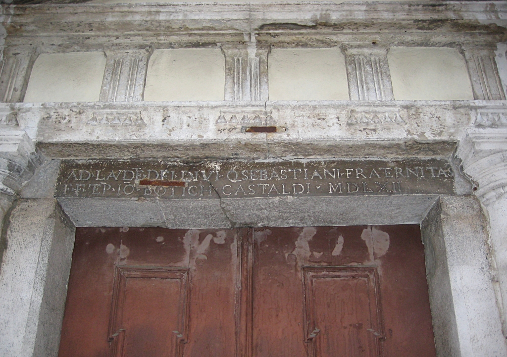 Natpis na ulazu u crkvu sv. Fabijana i Sebastijana u Rijeci.